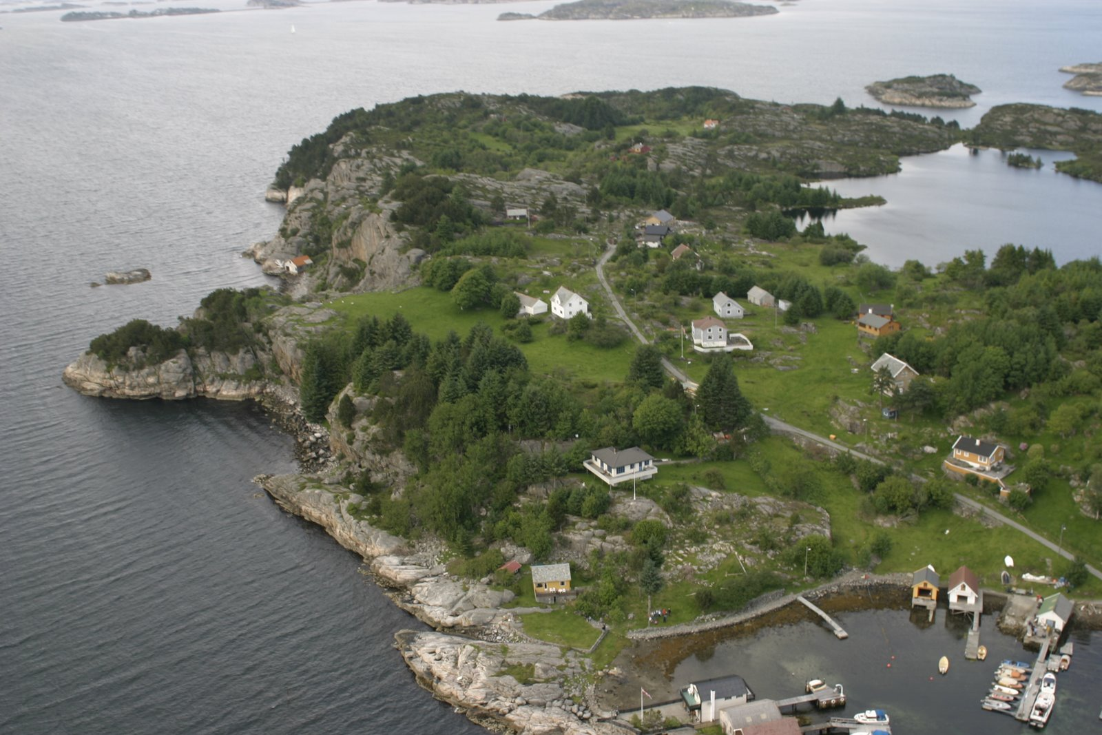 Øya Geitanger, Fjell kommune - Foto A. Halvorsen